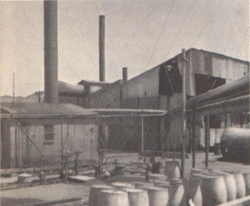 Primera destilería cosntruida por YPF en Comodoro Rivadavia y el país. Años después desmantelada